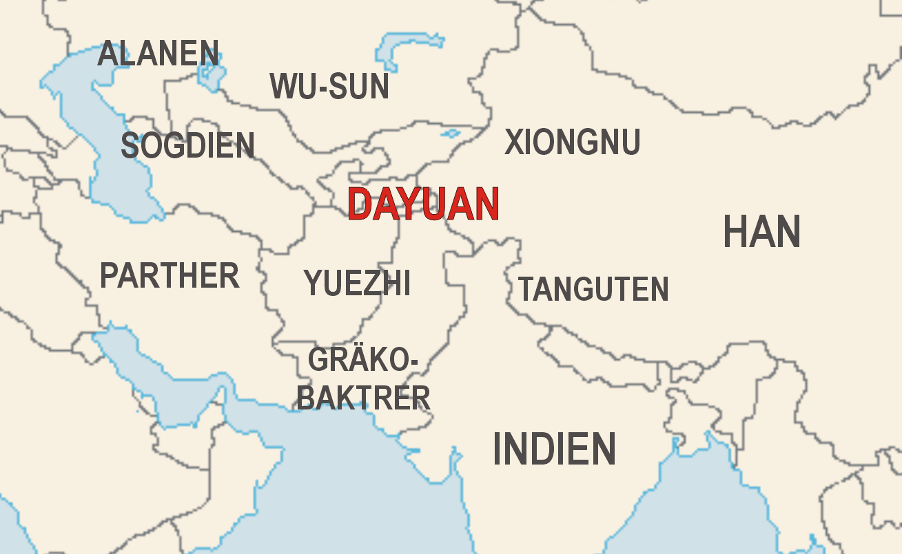 Dayuan